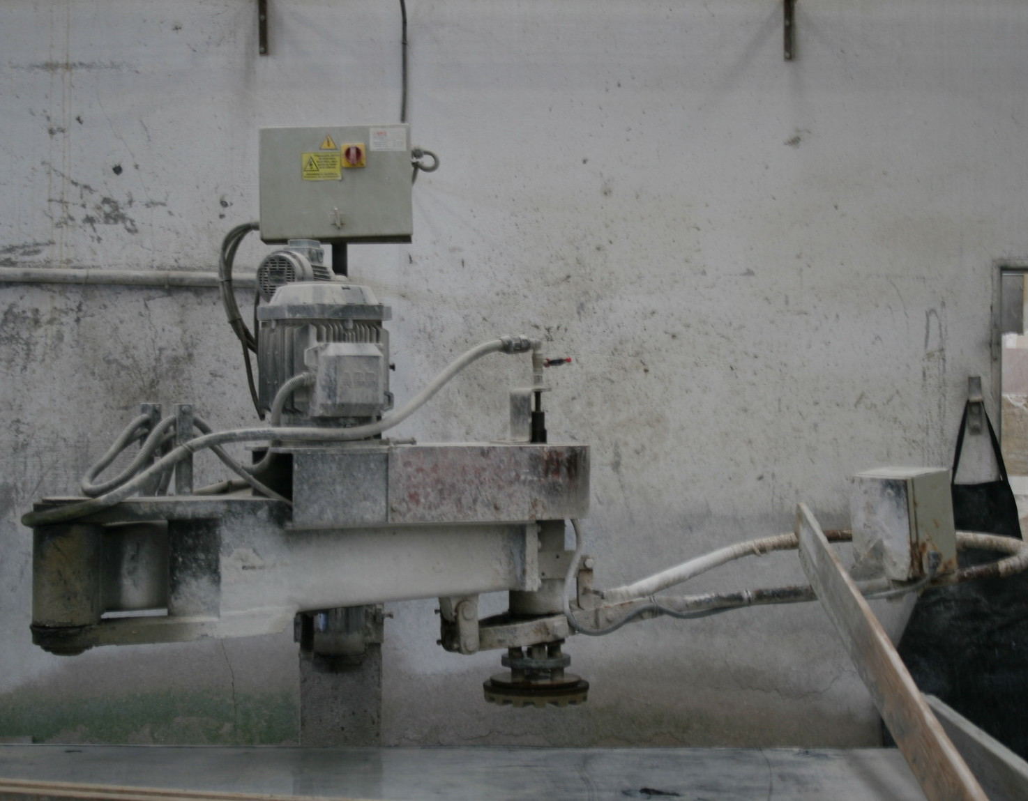 Gelenkarmschleifmaschine, einfach Ausführung